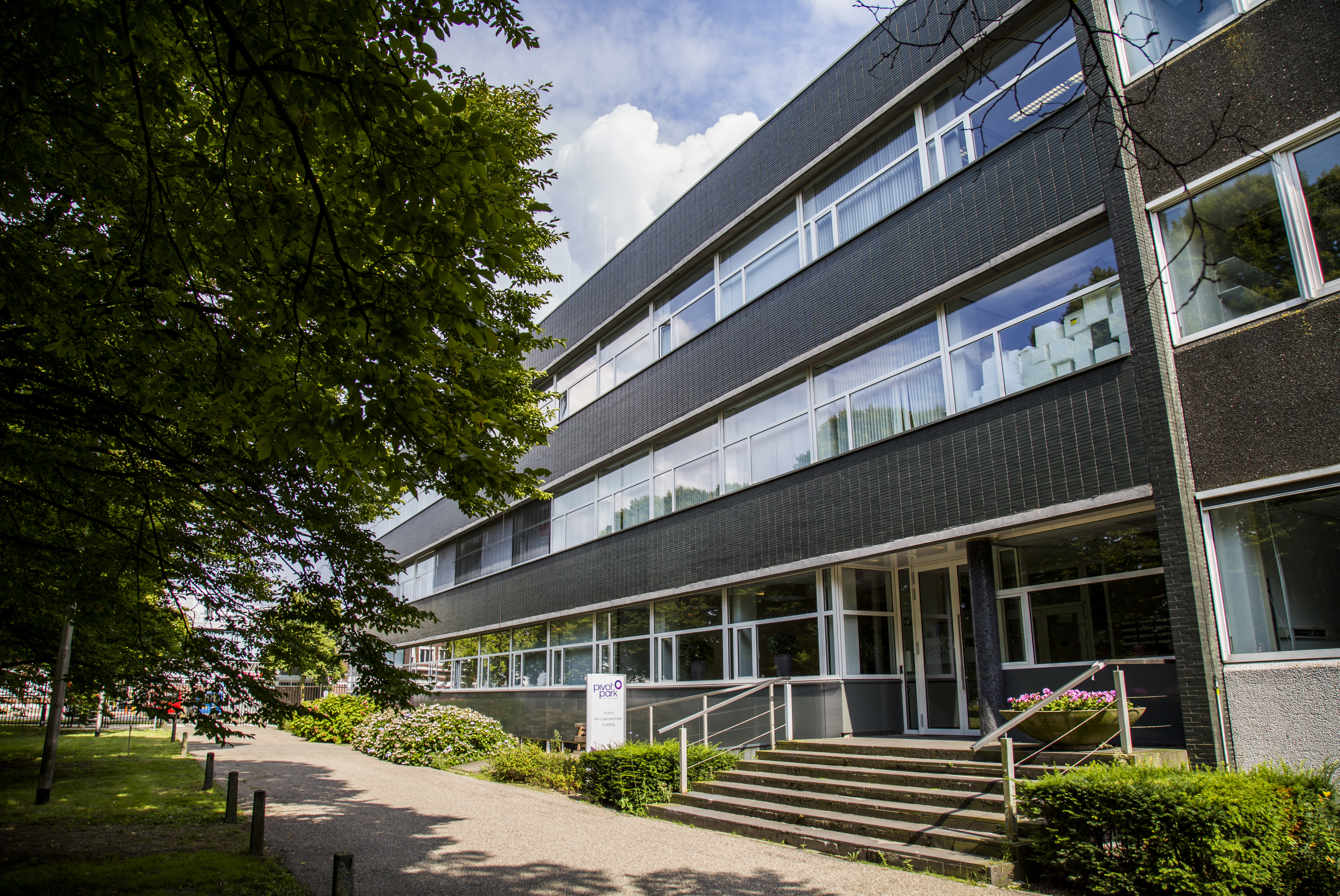 innatoss